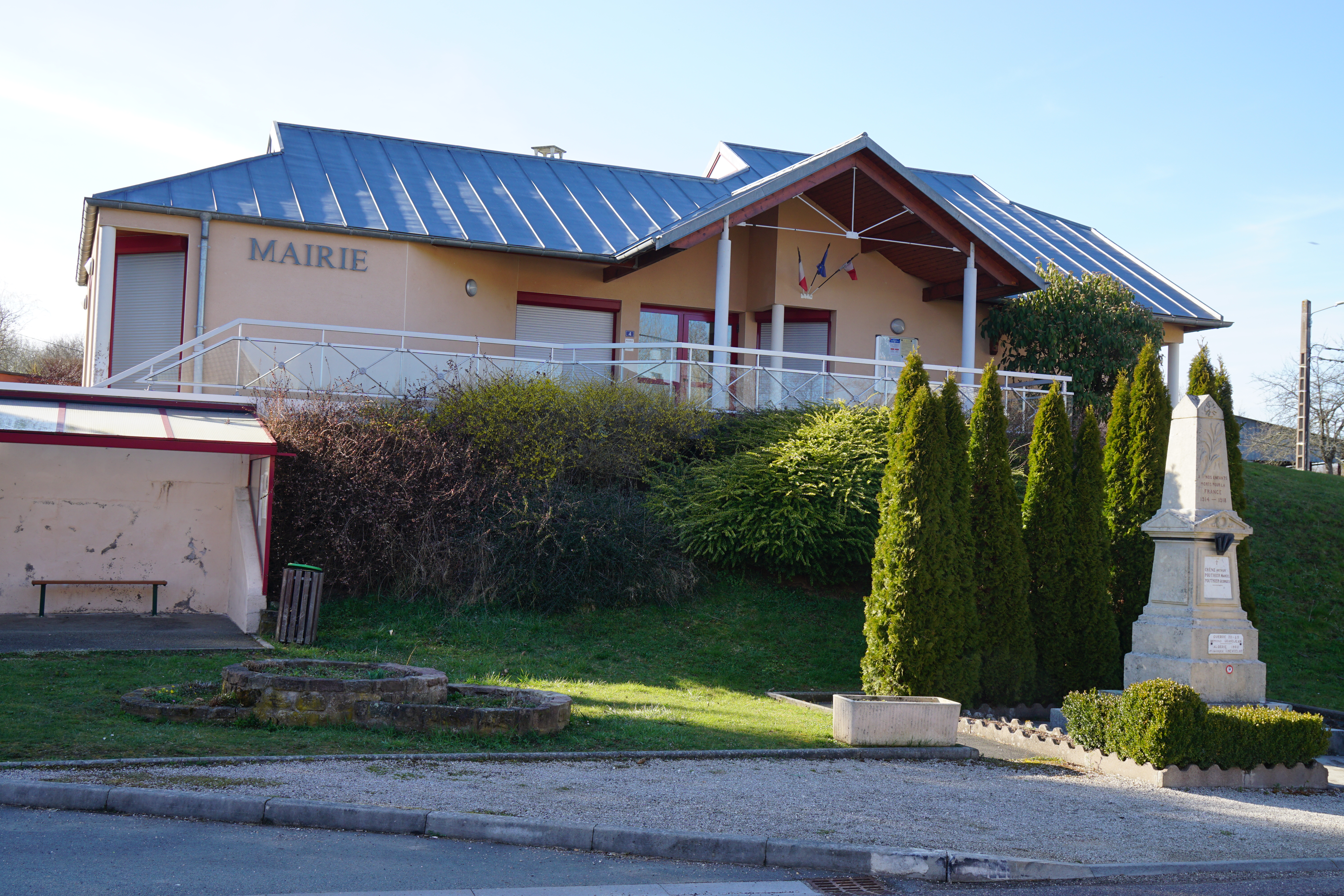 Mairie de La Vergenne.